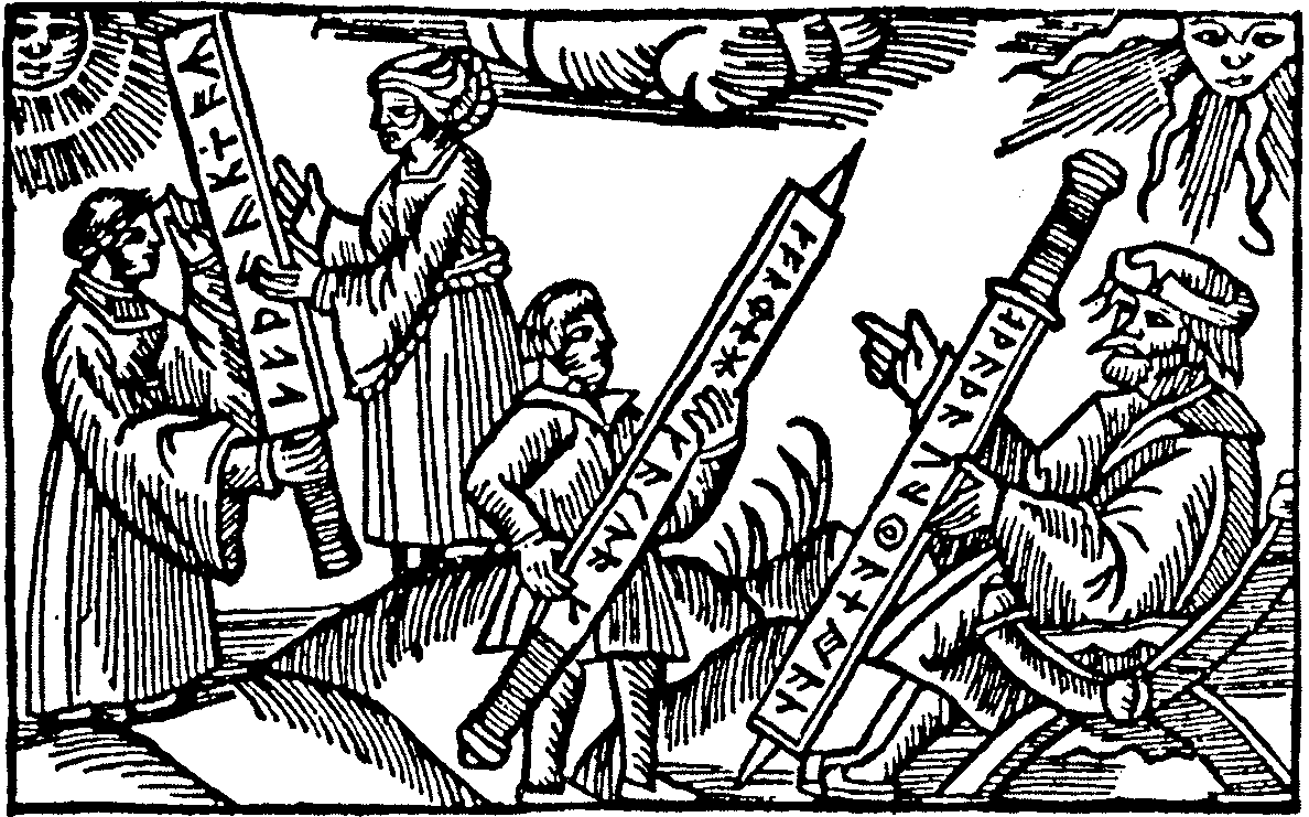 Runstav